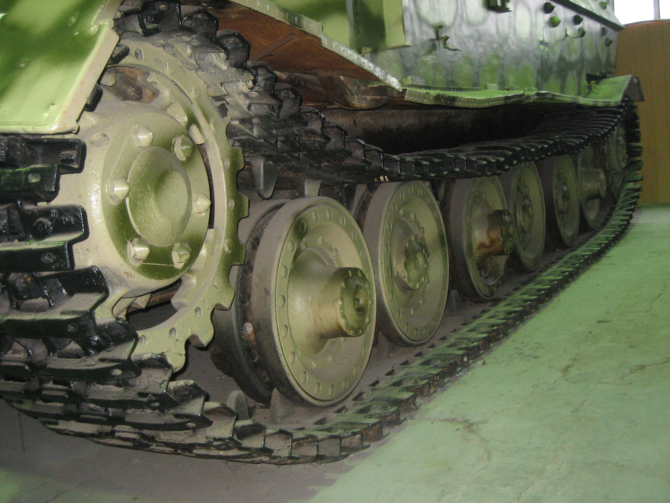 Panzerjäger Tiger (P) Ferdinand / Elefant (Sd.Kfz. 184), on display in Kubinka.